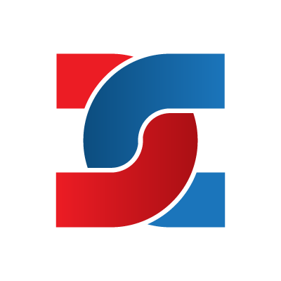 Српски (ћирилица): Логотип Савеза за Србију